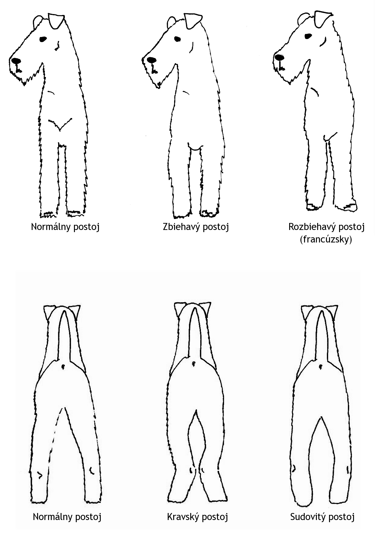 Popis: Postoj psa Zdroj: vlastná kresba Dátum: 30.12.2005 Autor: Prskavka Povolenie: PD Iné verzie tohto súboru: nie